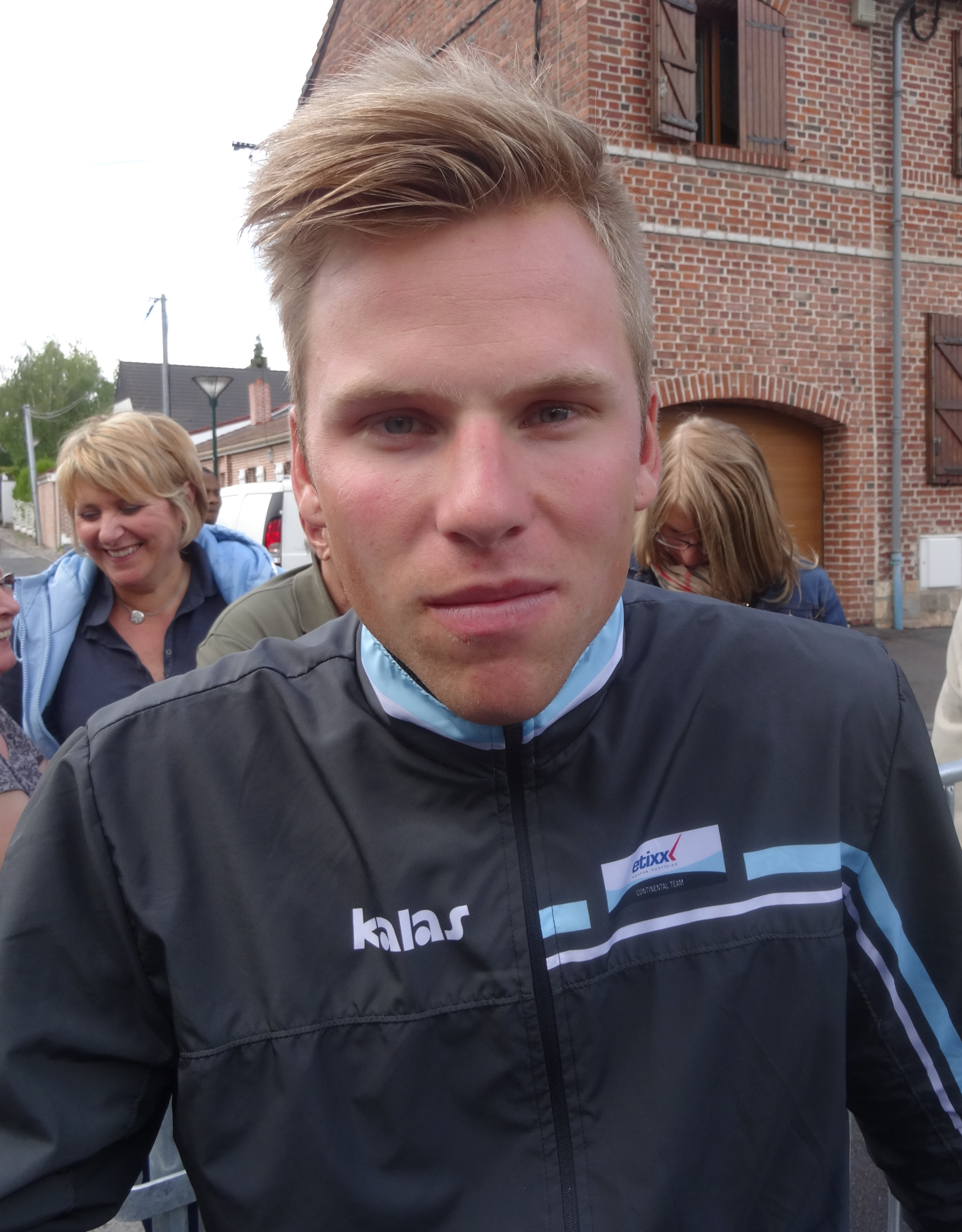 Reportage photographique réalisé le vendredi 23 mai 2014 à l'occasion du départ de la première étape du Paris-Arras Tour 2014 à Lens, Pas-de-Calais, Nord-Pas-de-Calais, France. Depicted person: Tim Kerkhof